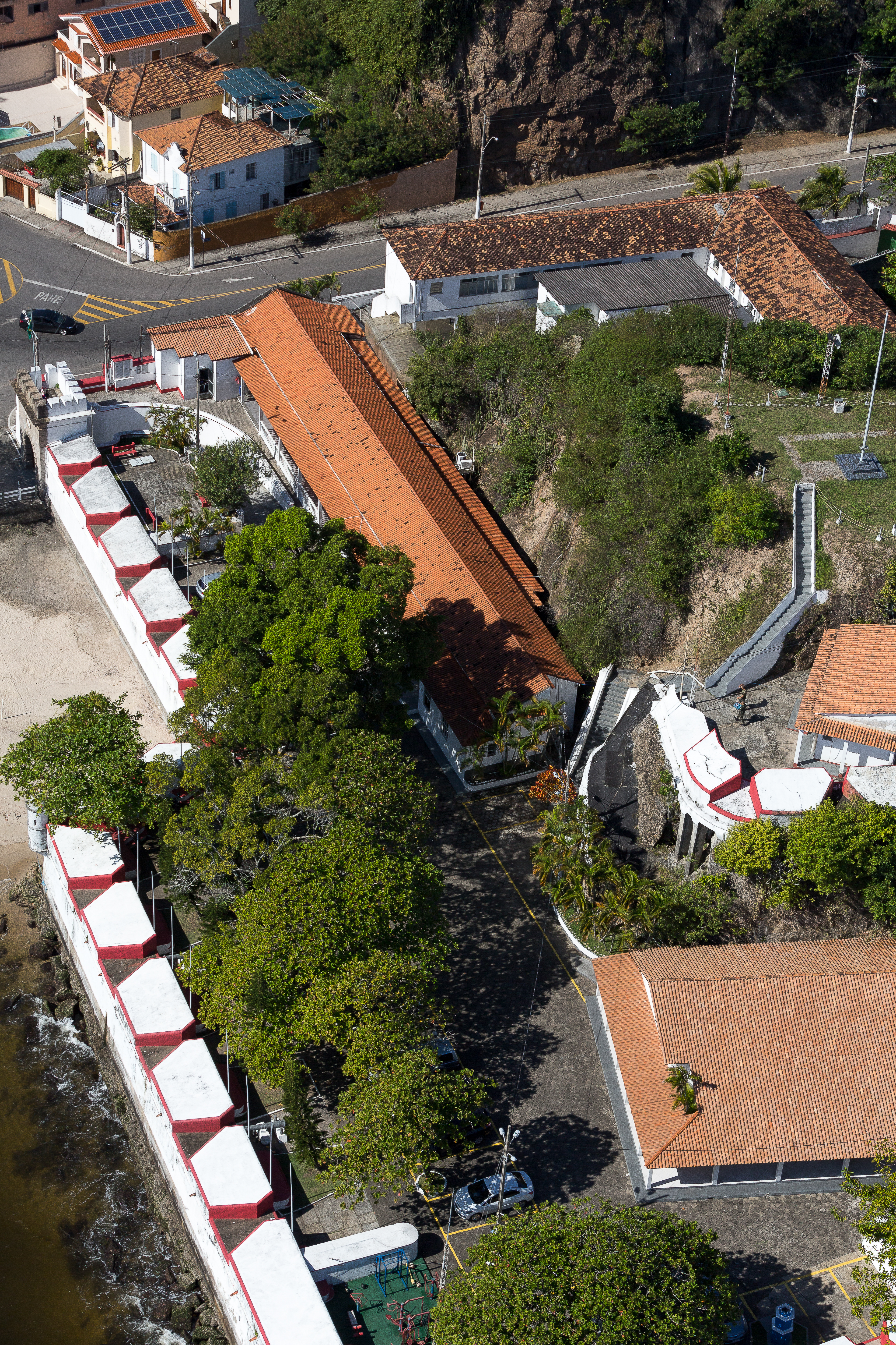 Vista aérea do Forte de São Domingos de Gragoatá localizado na cidade de Niterói - RJ - Brasil.